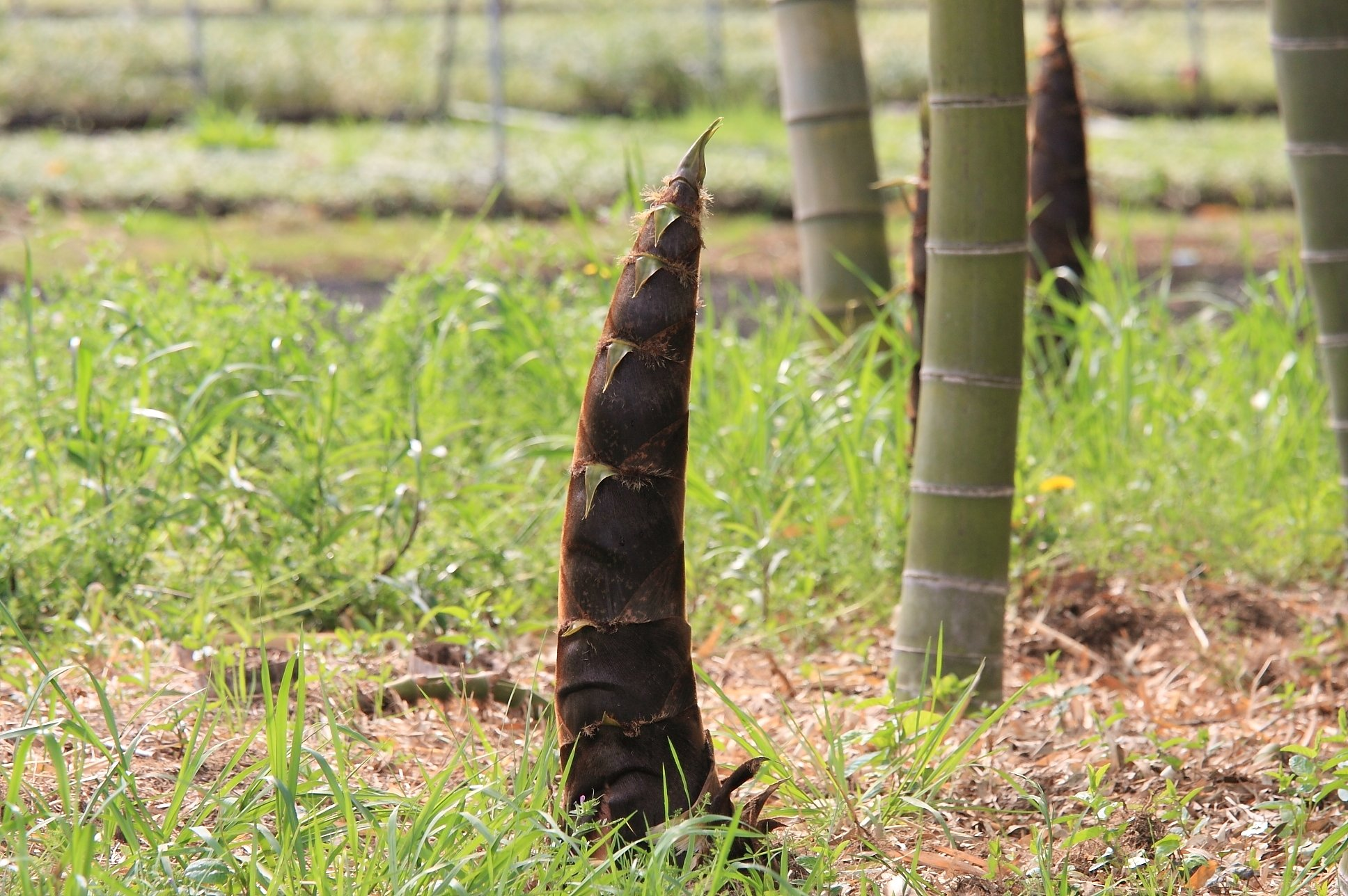 モウソウチク?の筍。横浜市・和泉川沿いにて。